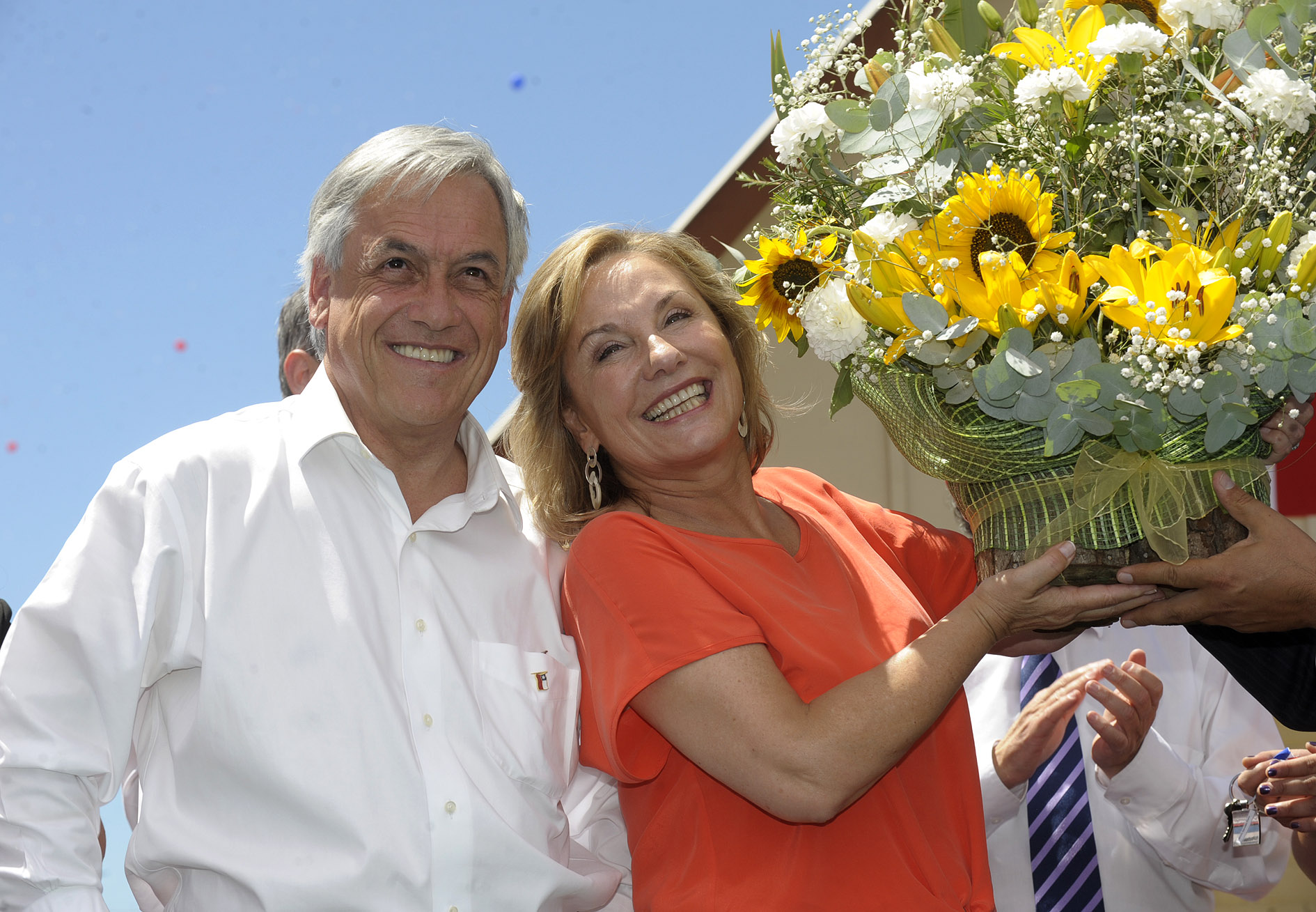 22-02-2012 Primera Dama en Sn Clemente